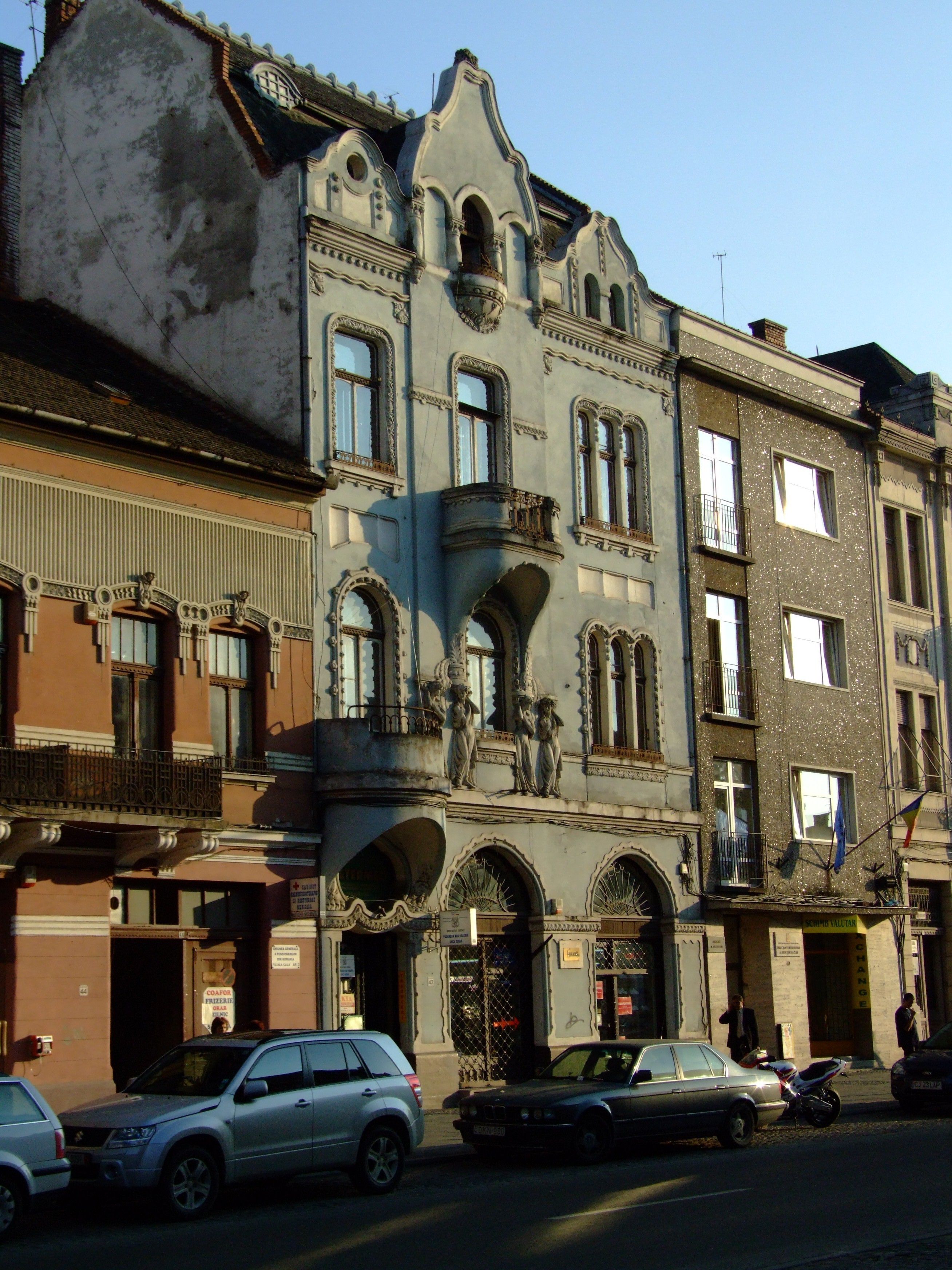 Cluj-Napoca, Bulev. Eroilor nr.42